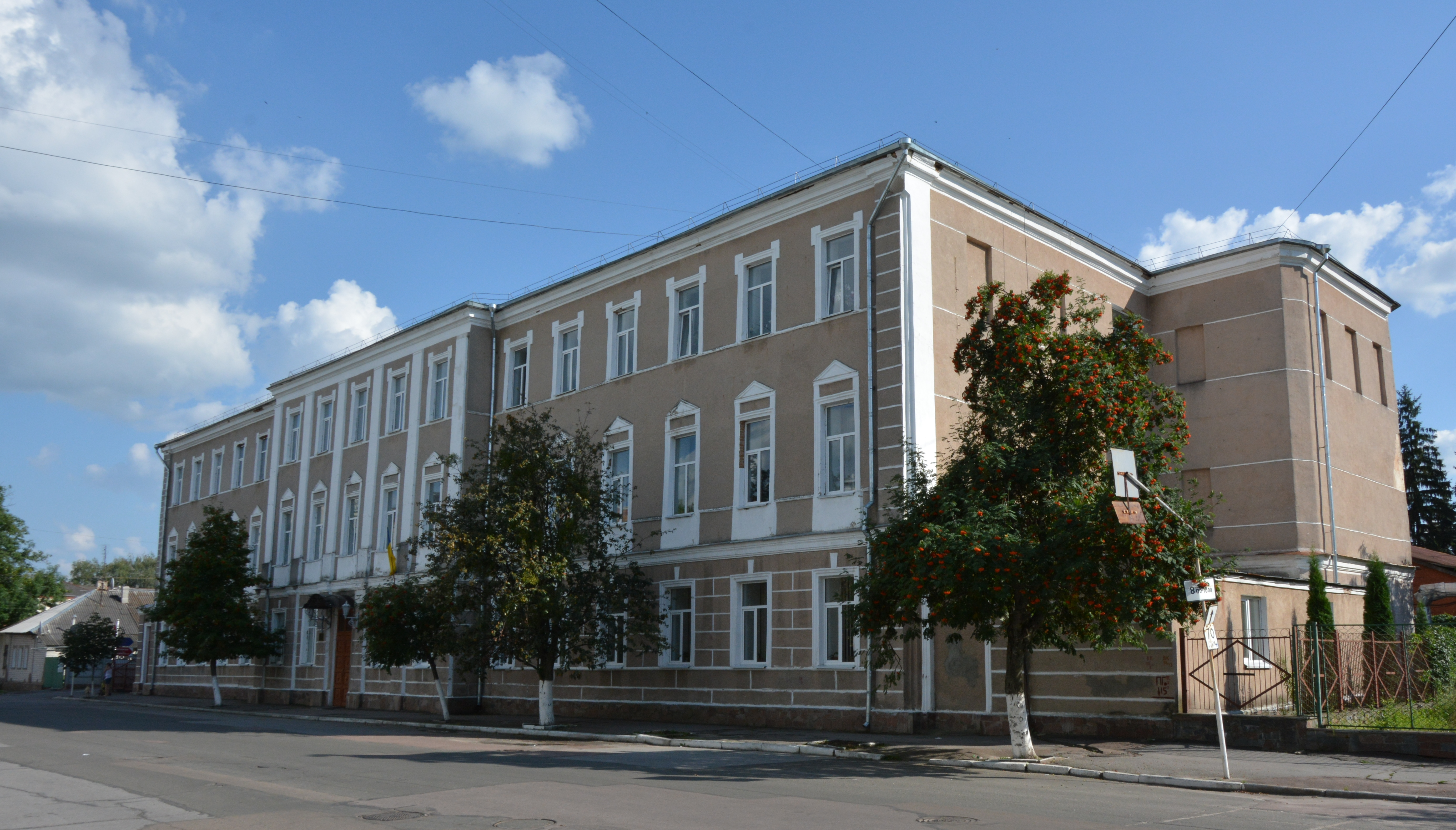 Друга чоловіча гімназія, Житомир, вул. Пушкінська, 42